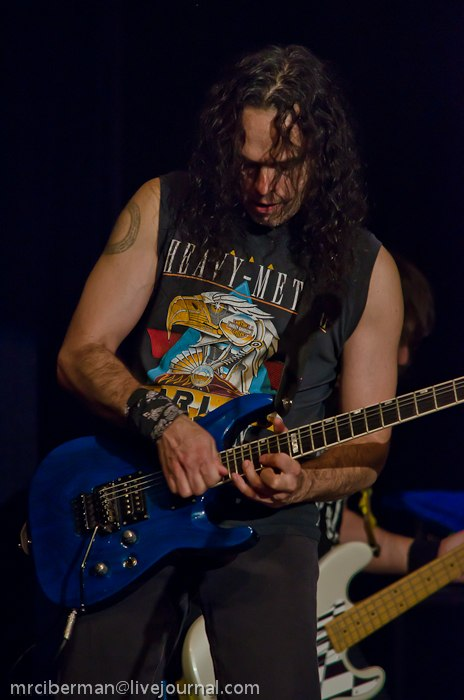 Концерт Арии в Калуге 04/10/2012.